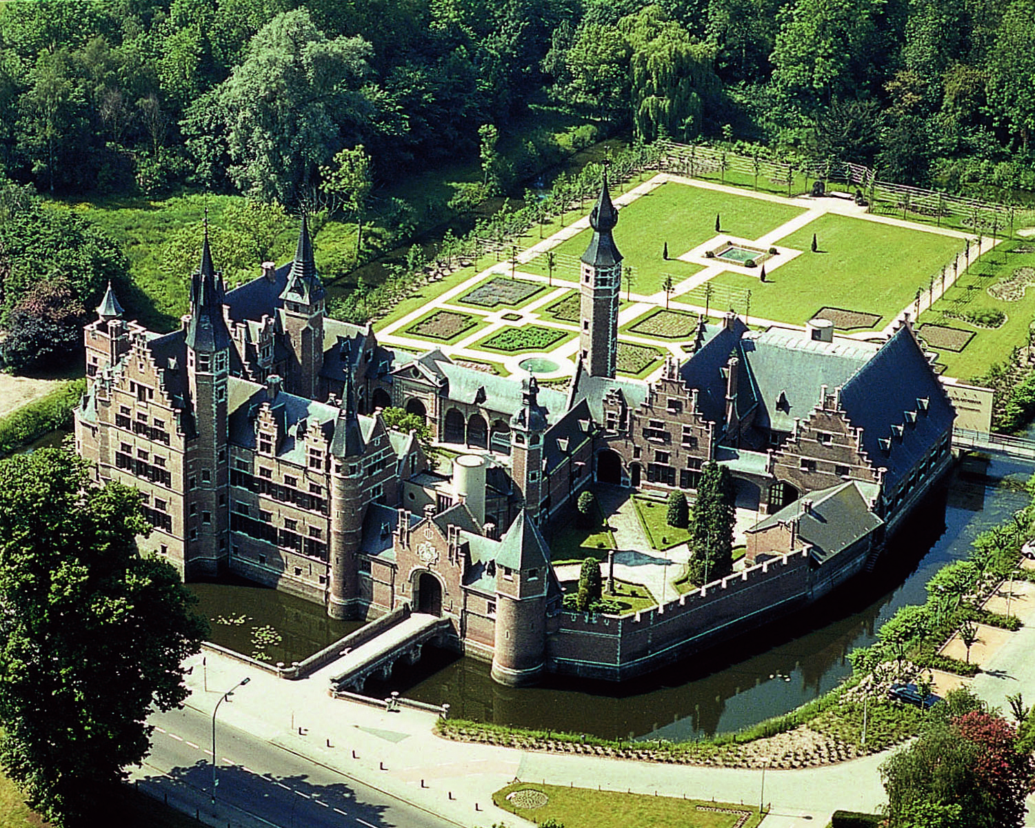 Het Zilvermuseum is gevestigd in het kasteel Sterckshof in Deurne (Antwerpen), een huis met vele kamers en ruimte voor zilver.